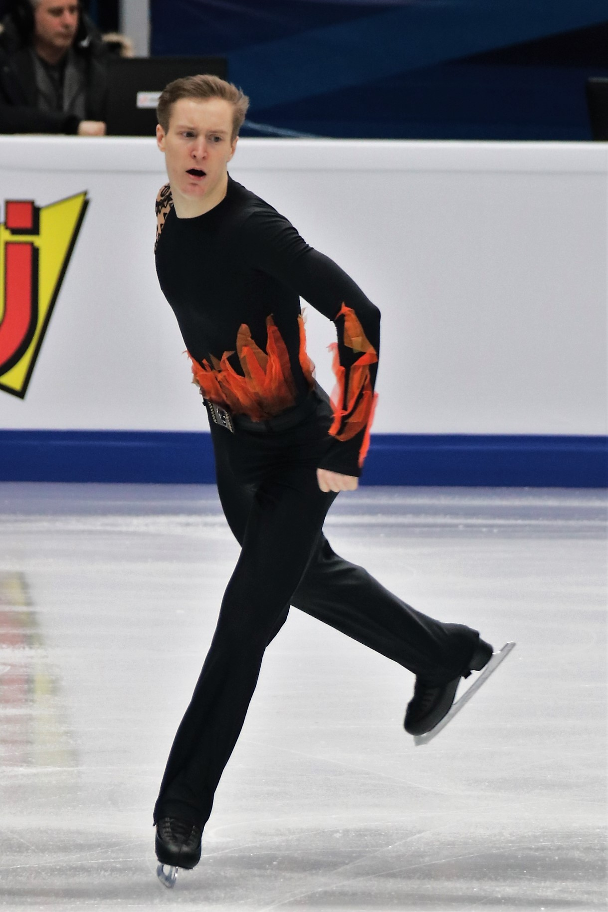 Александр Самарин (Россия) на Чемпионате Европы по фигурному катанию 2018.